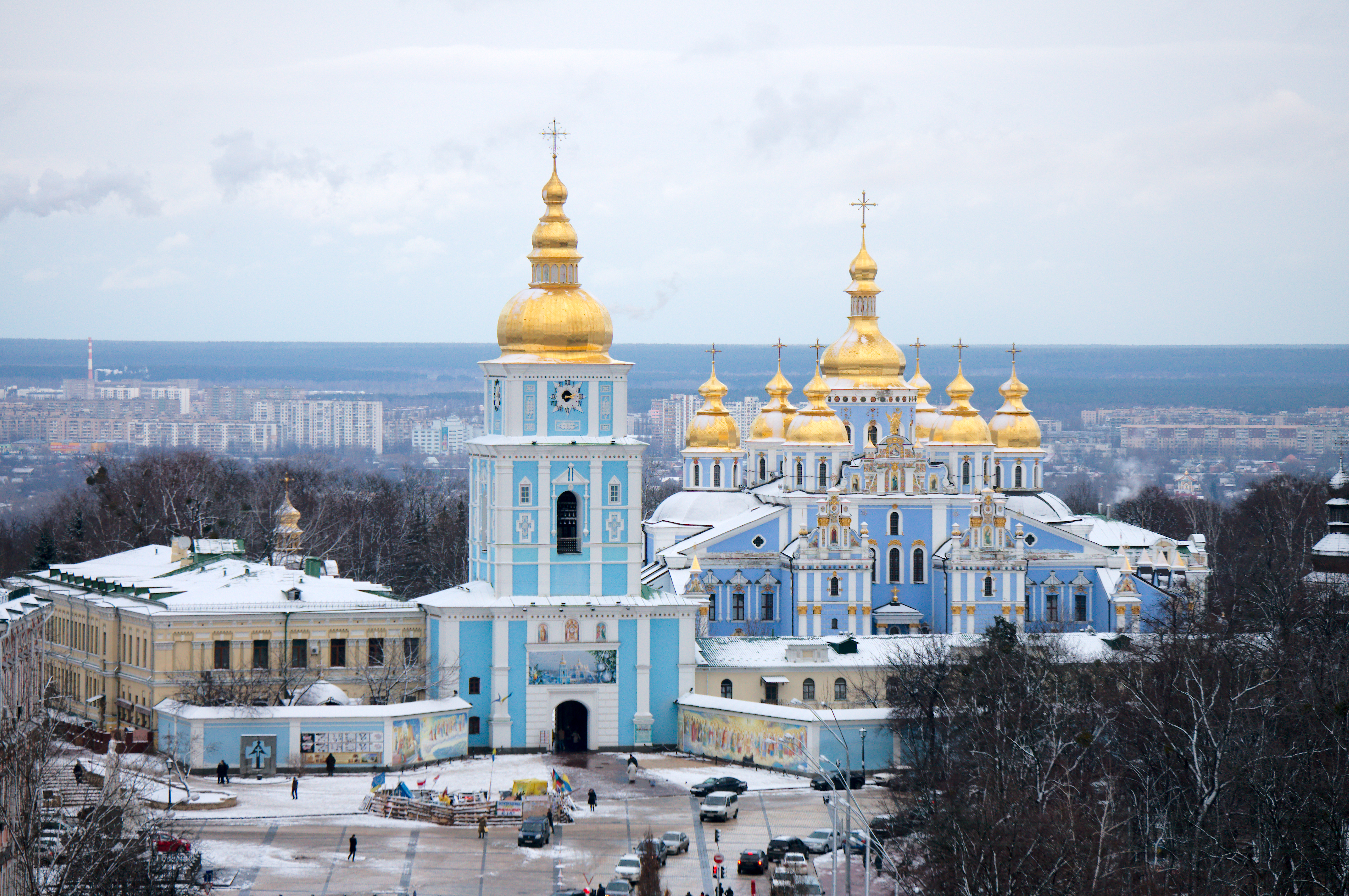 Euromaidan in Kiev